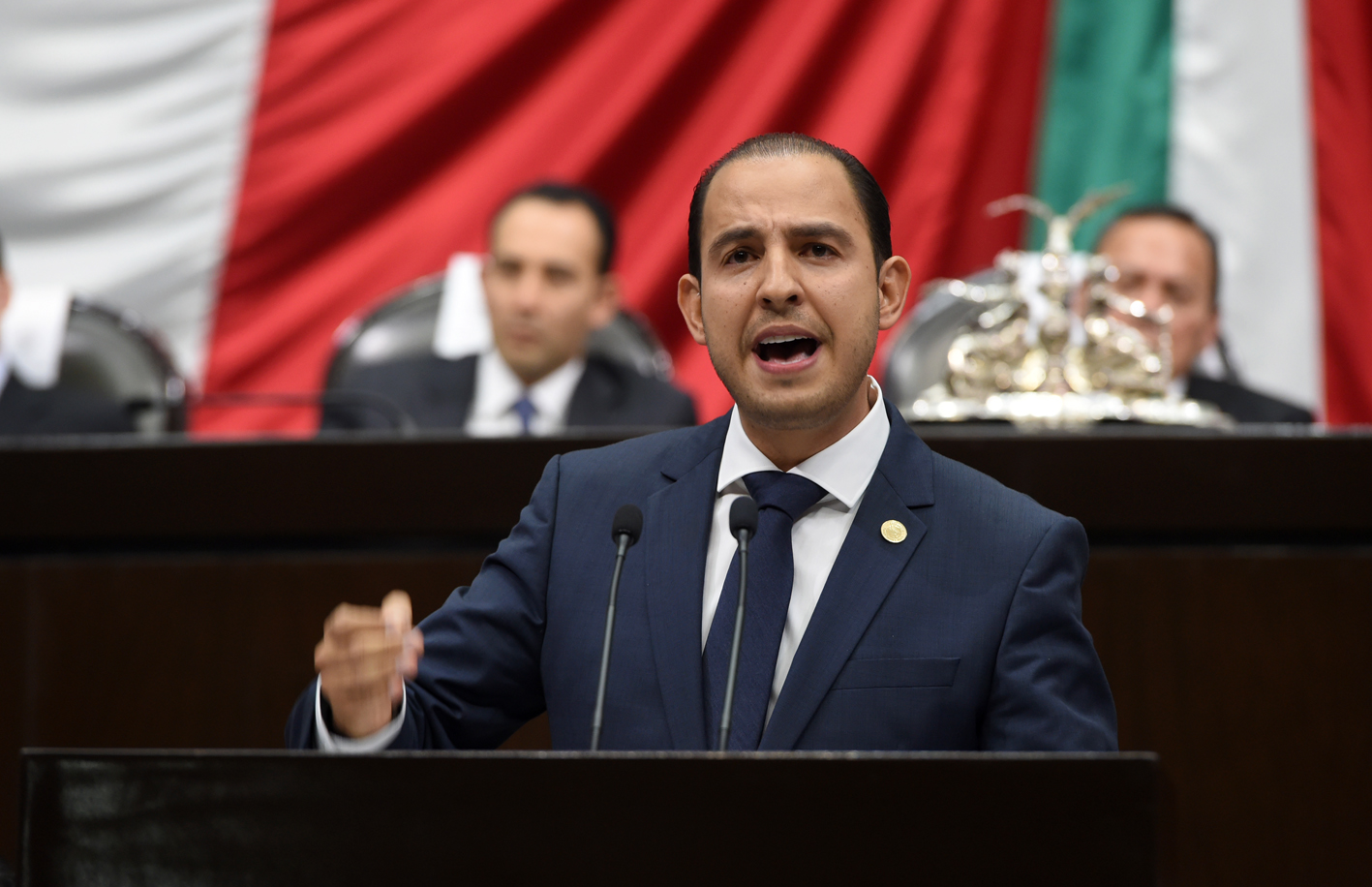 Posicionamiento de Marko Cortés Mendoza, coordinador del Grupo Parlamentario del Partido Acción Nacional